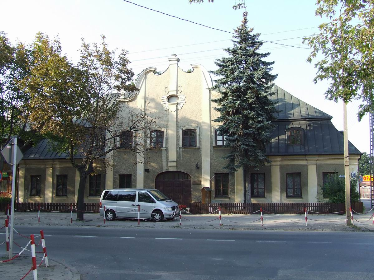 Barokowy Dom Gdański przy rynku w Węgrowie